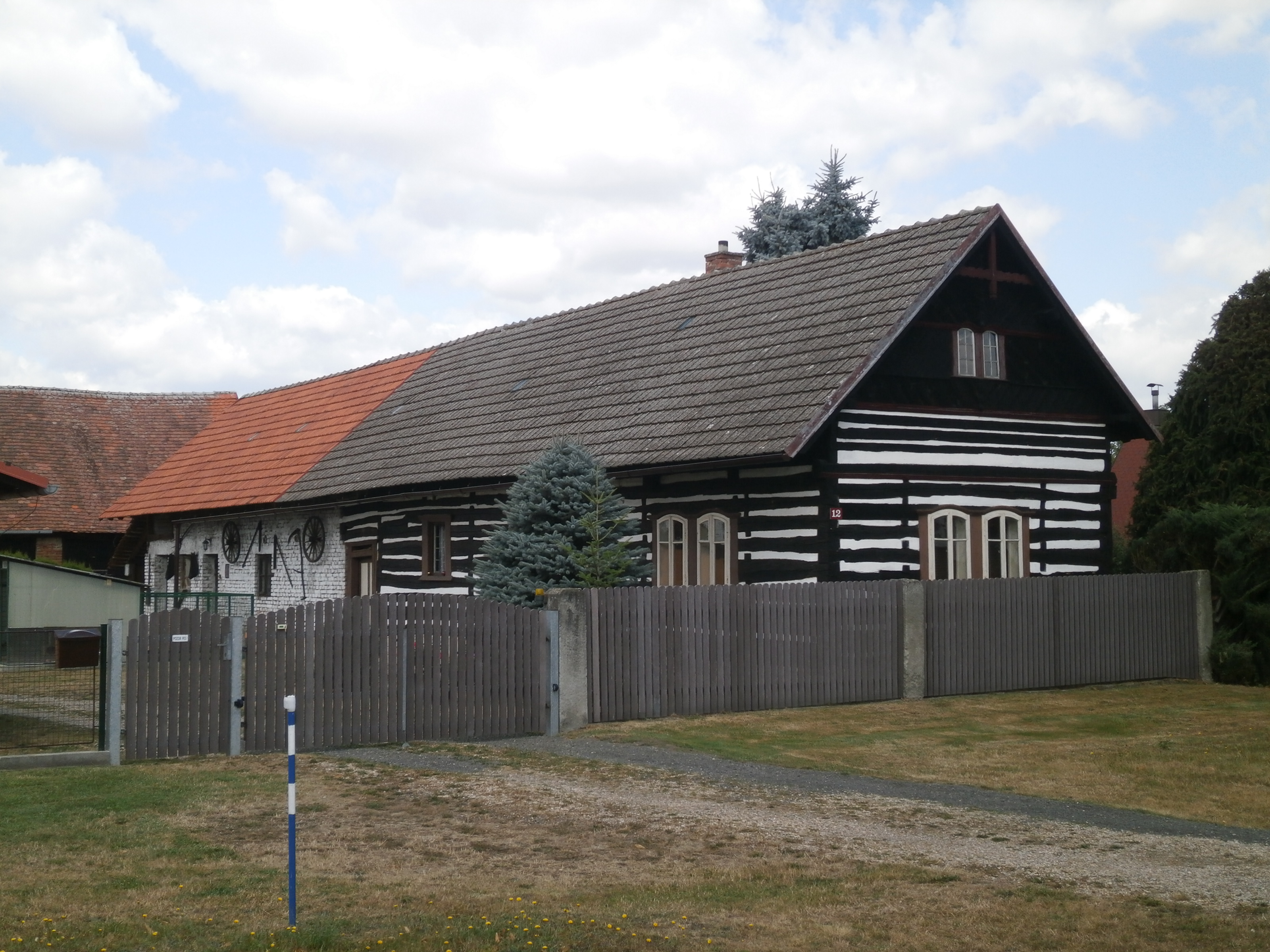 Obrubce - č.p. 12